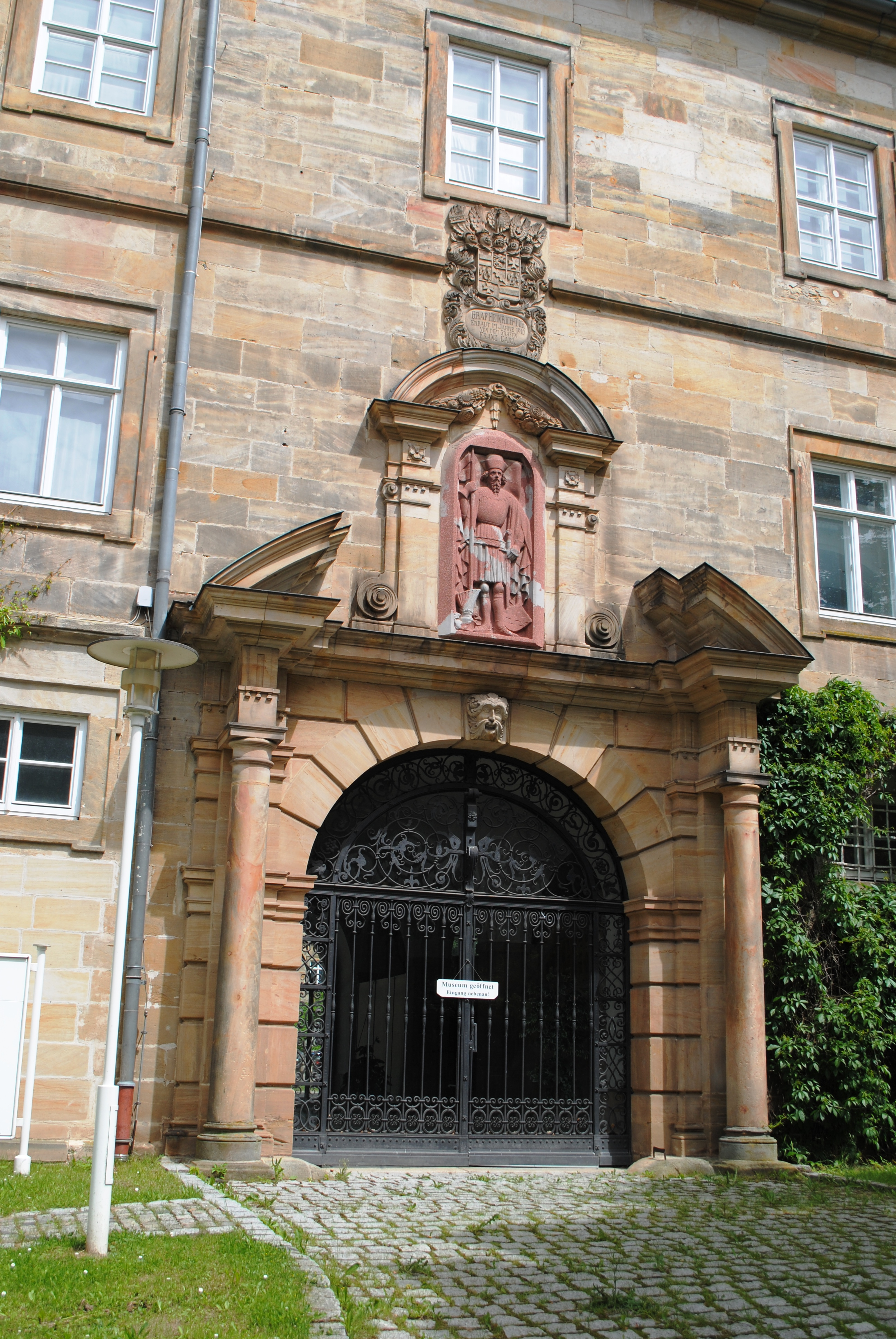 Portal, Schloss Tambach, Tambach, Inschrift: "Graf Heinrich-Tor/ Erbaut im Jahre 1910/ von dem Grafen/ Franz Carl."